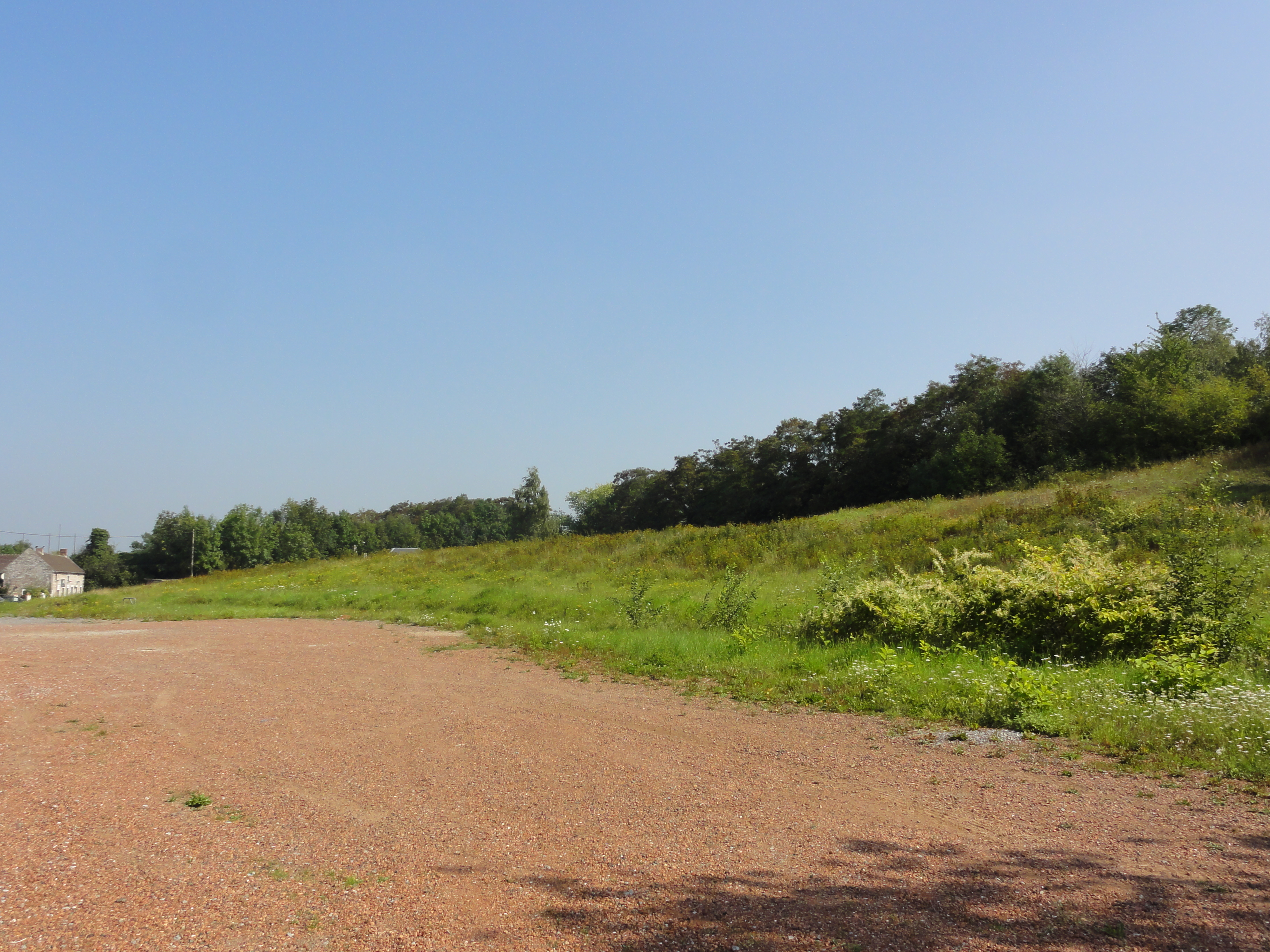 Terril n° 199 dit 2 de Crespin, Fosse n° 1 - 1 bis de la Compagnie des mines de Crespin, Quiévrechain, Nord, Nord-Pas-de-Calais, France.